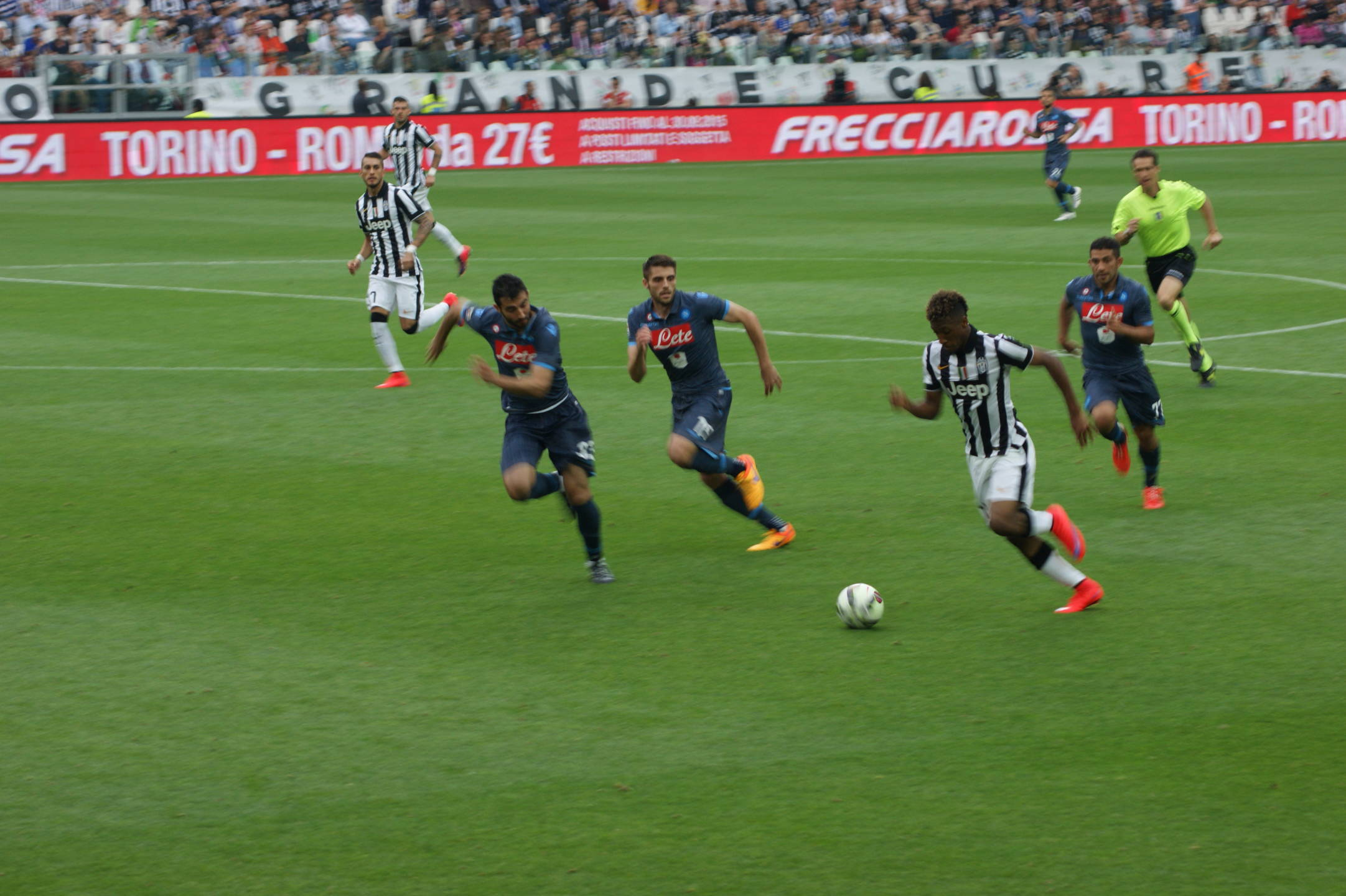 Torino, Juventus Stadium, 23 maggio 2015. Juventus FC vs SSC Napoli (3-1), 37ª giornata del campionato di Serie A 2014-15.